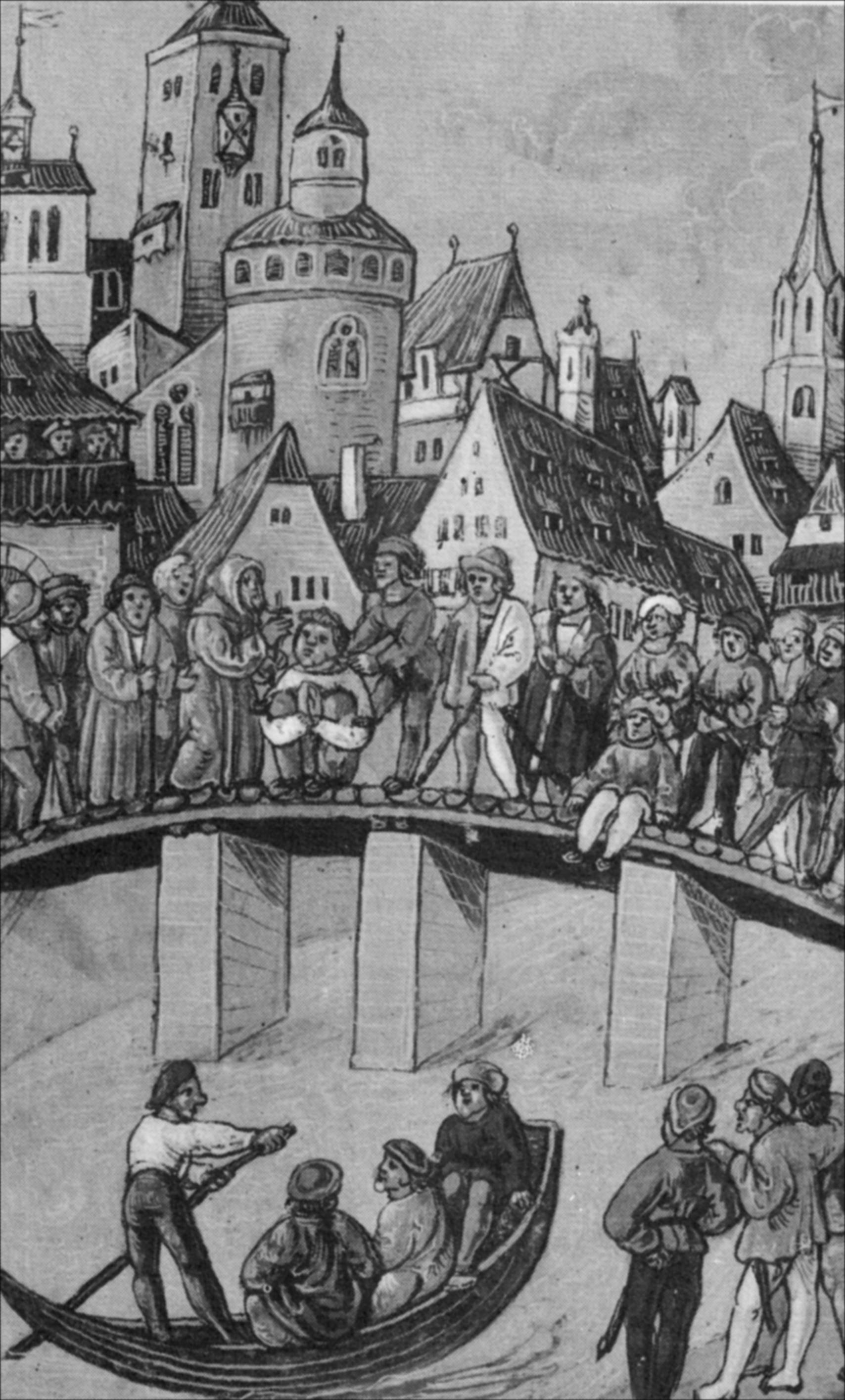 Ertränken eines Glockengiessers durch Sturz von der Brücke zu Konstanz um 1480